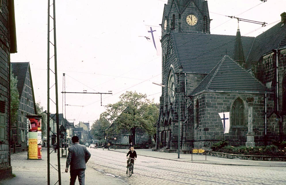 Asselner Hellweg, Ev. Lutherkirche, 1960This is a photograph of an architectural monument. 0189